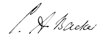 GIF document